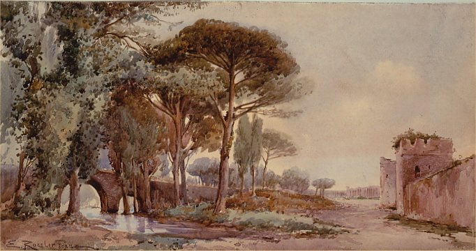 Villa Ludovisi in Rome (rione Ludovisi)